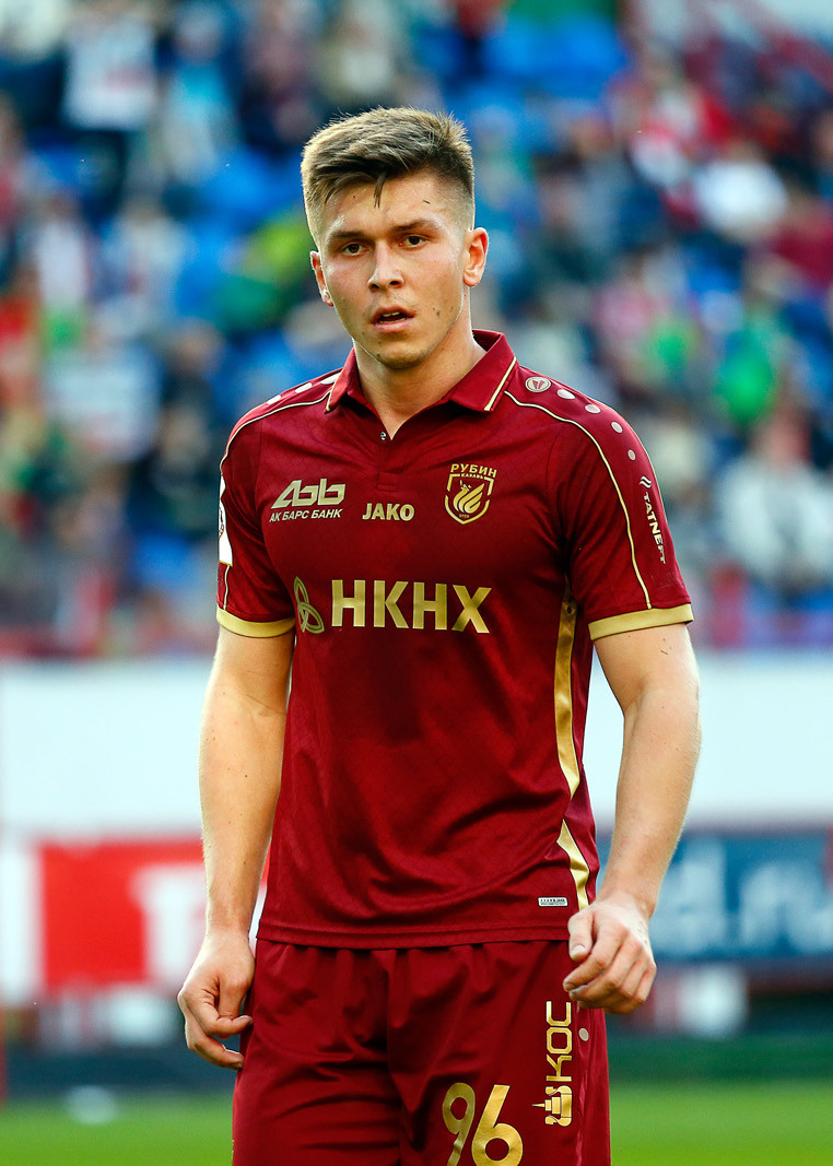 «Локомотив» - «Рубин»